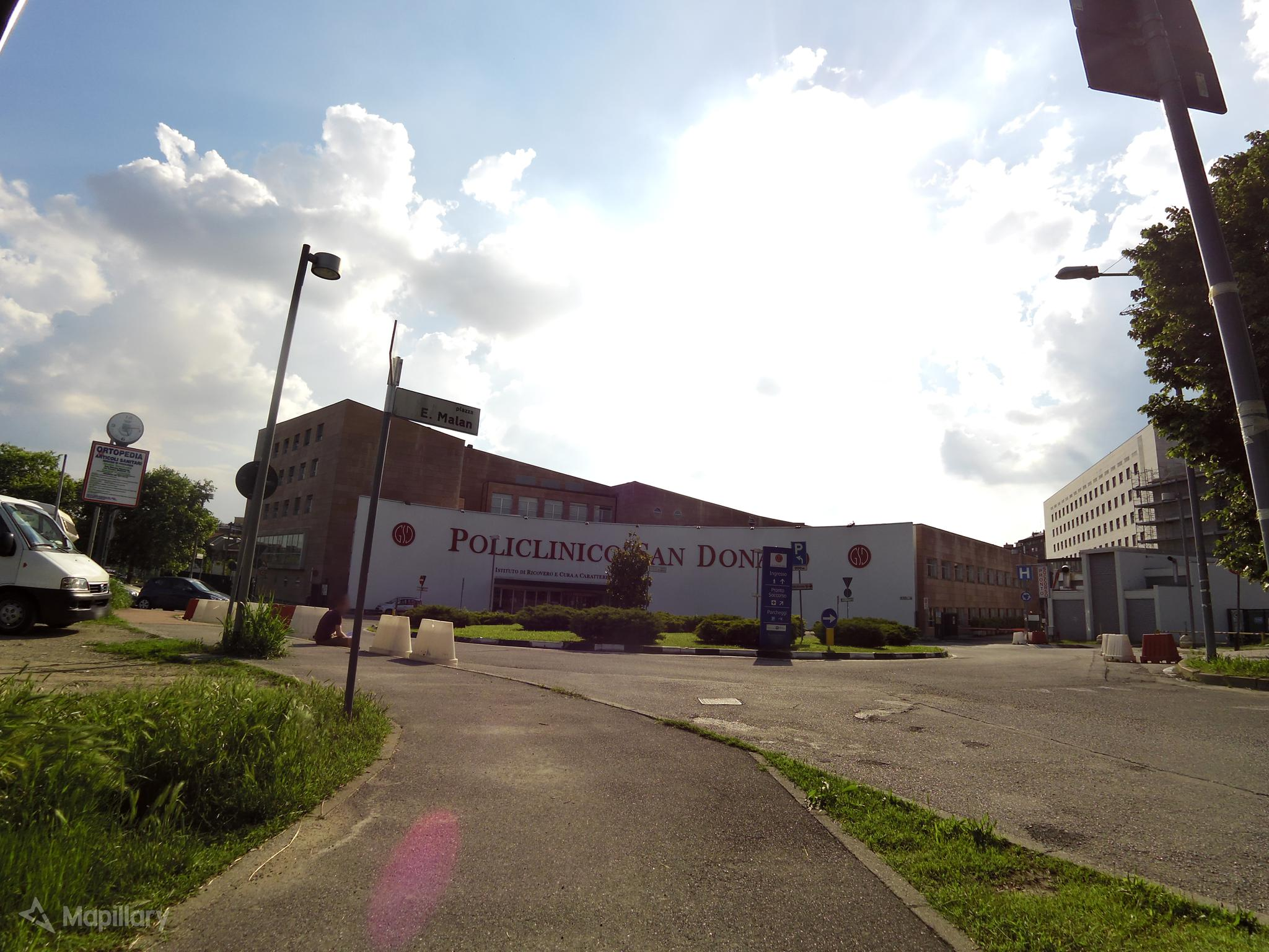 Gruppo Ospedaliero San Donato (maggio 2018)